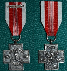 Krzyż Solidarności Walczącej